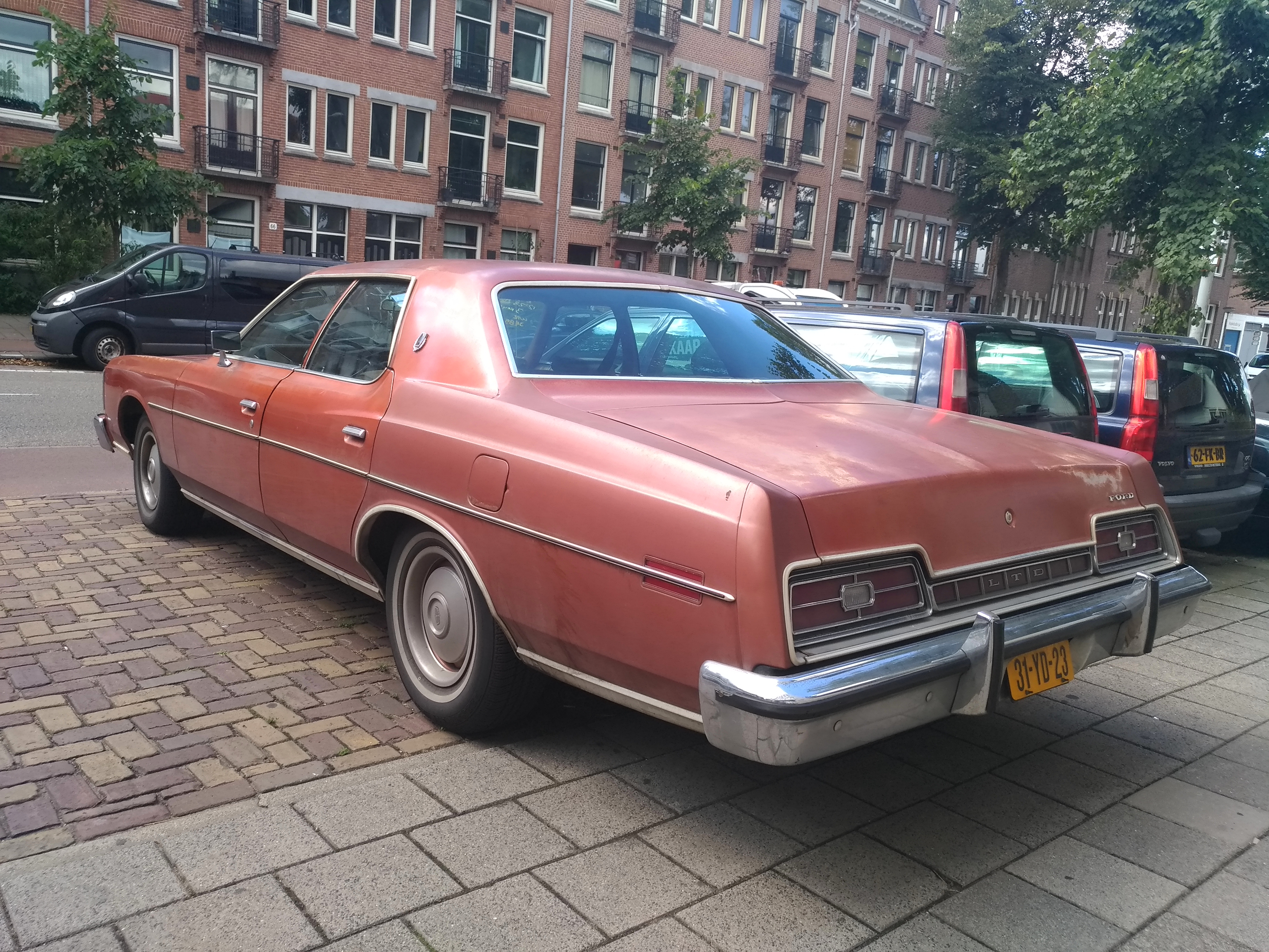 1973 Ford LTD (V8 7.0 200 hp) at Amsterdam